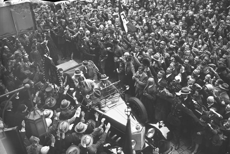 Der grosse Aufmarsch der Nationalsozialisten in Weimar vor dem Führer Adolf Hitler. Anwesend waren der thüringische Innenminister Nationalsozialist Dr. Frick, sowie der nationalsozialistische Reichstagsabgeordnete Dr. Goebbels (Berlin). Tausende von Menschen begrüssen den Führer der Nationalsozialisten Adolf Hitler (vorn im Auto sitzend) nach seiner Ankunft vor dem Nationaltheater in Weimar.